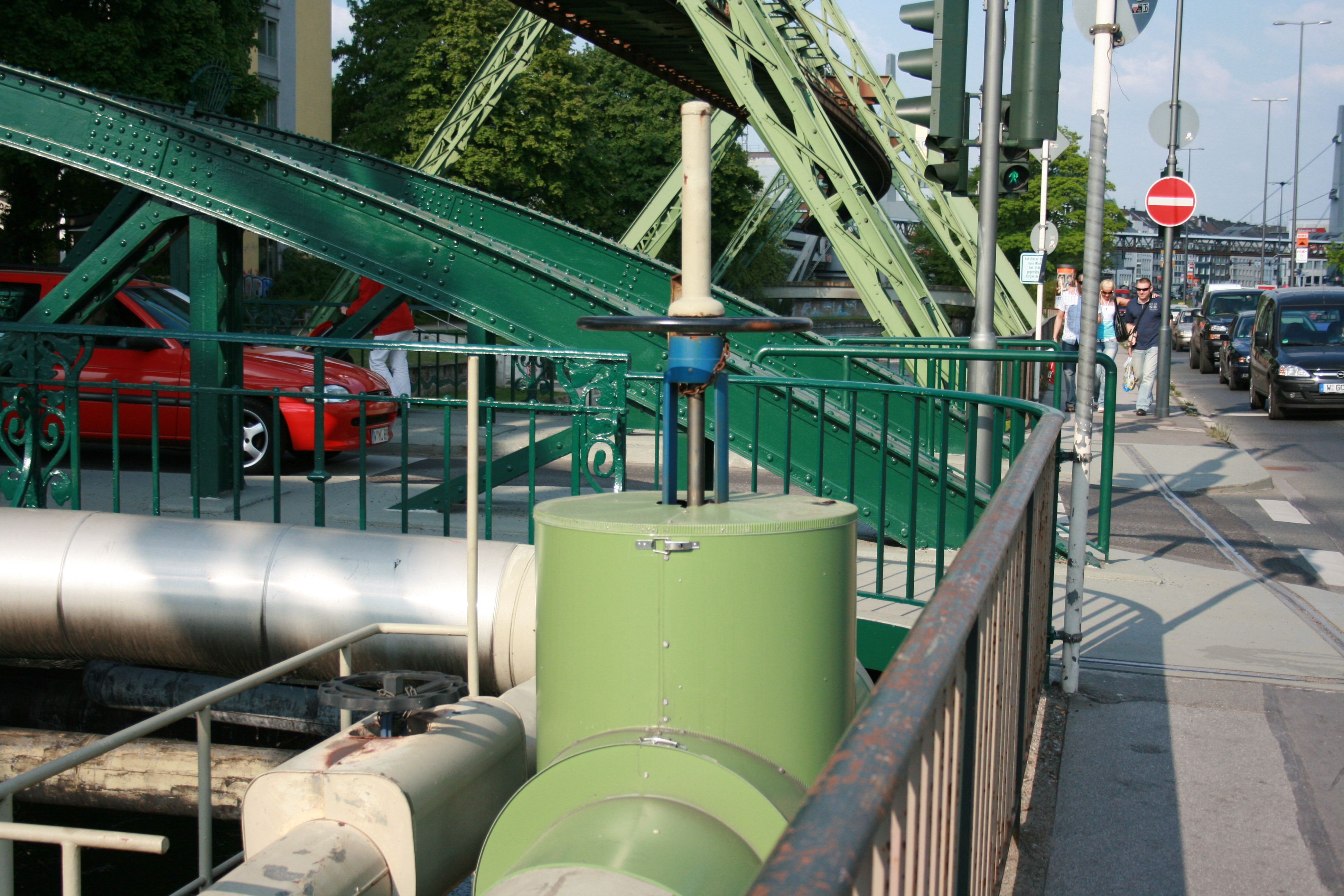 Dörner Brücke in Wuppertal